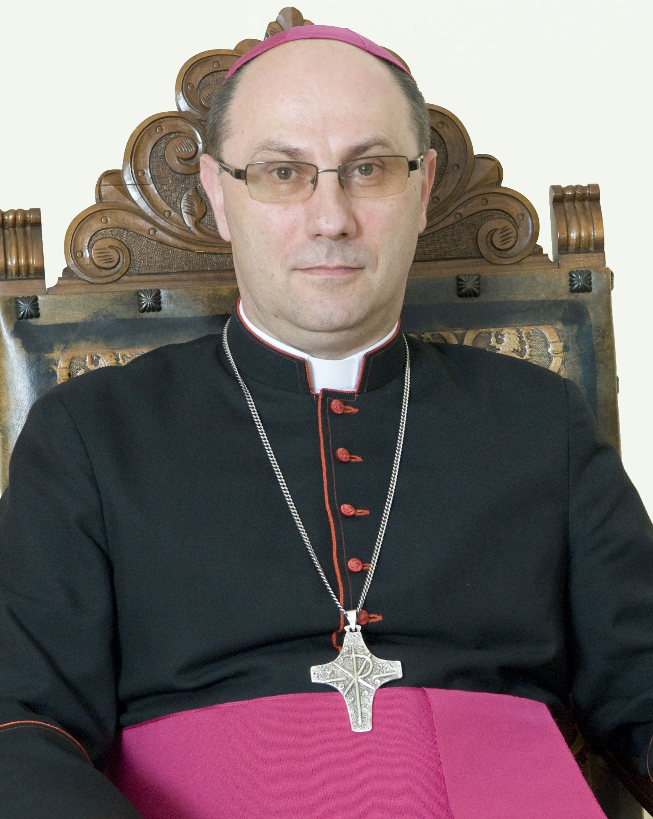 Wojciech Polak